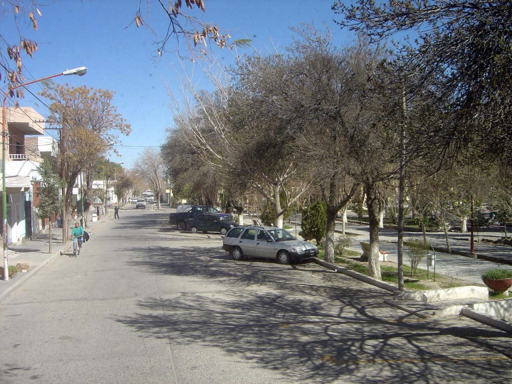 Calle Belgrano y Plaza Gral. Belgrano en Santa María, Catamarca